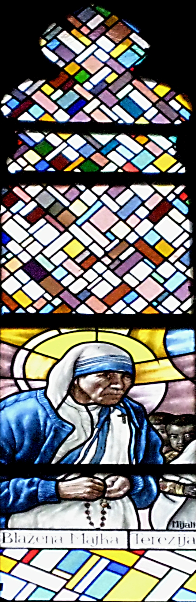 vitraj Majke Terezije u crkvi Gospe Lurdske u Rijeci, rad Roberta Mijalića